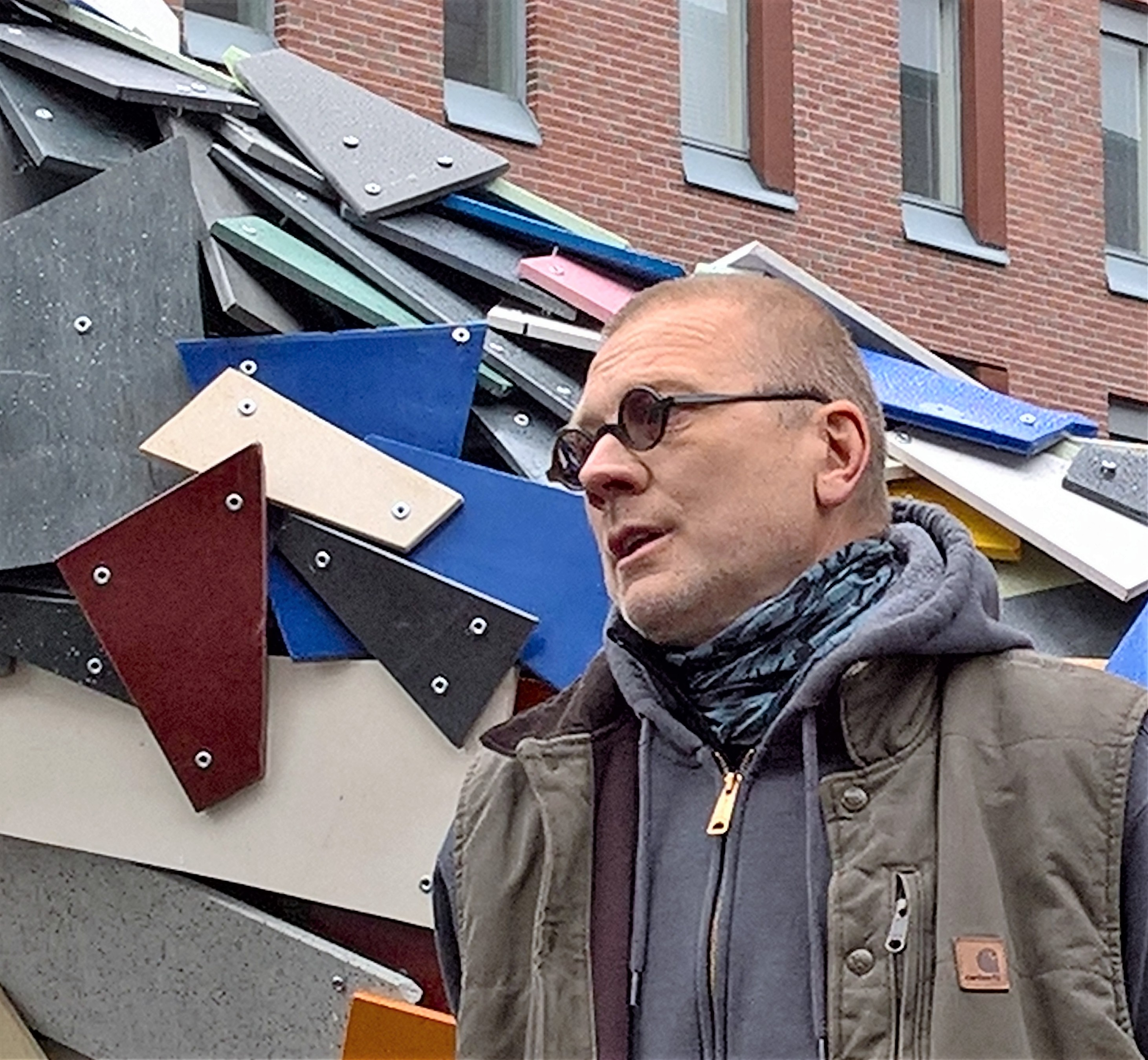 Kuva taiteilija Villu Jaanisoosta vuonna 2016.